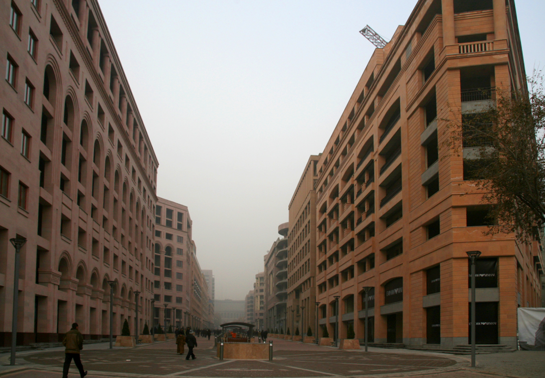 L'avenue du Nord, Erevan, décembre 2007